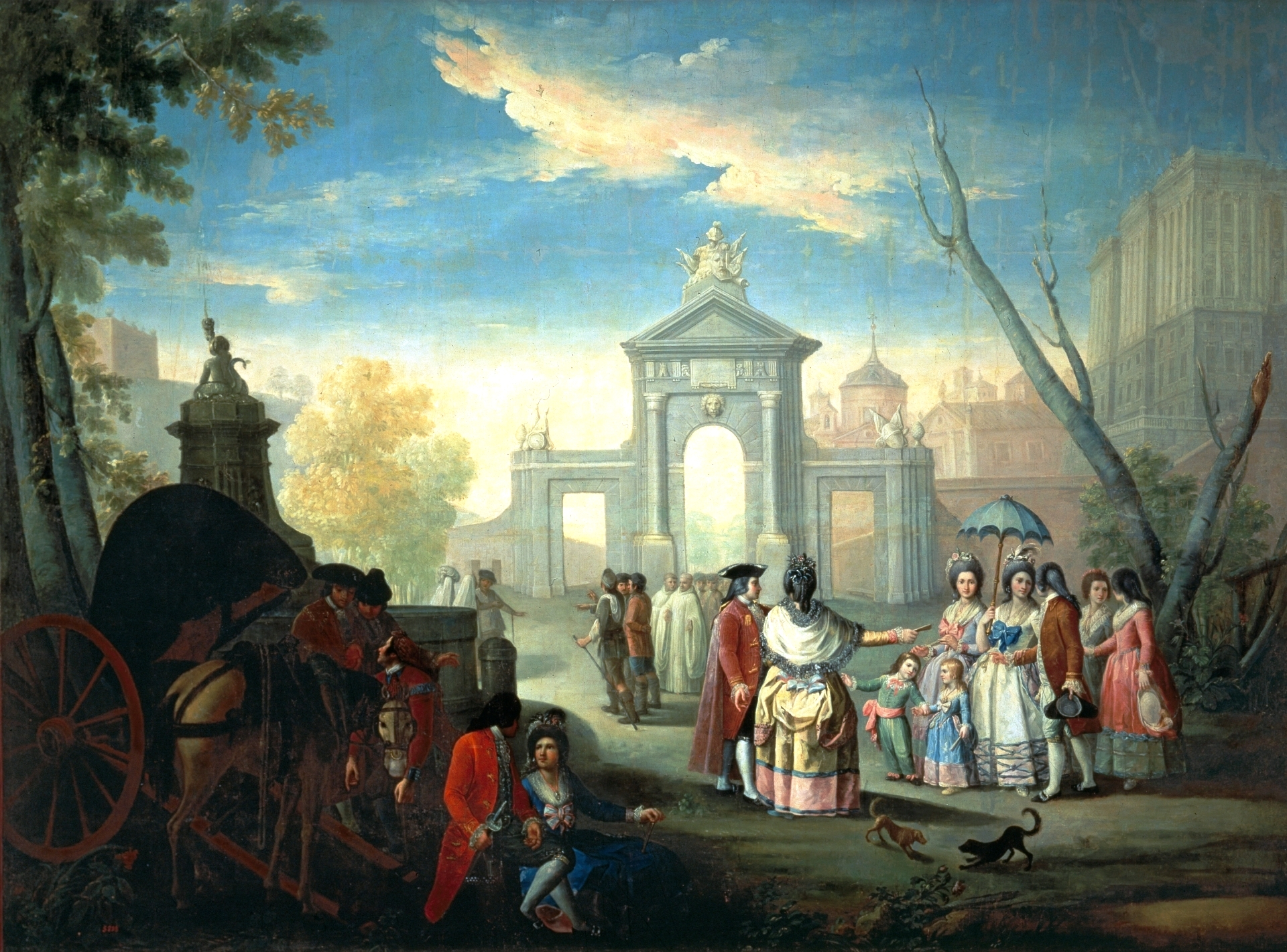 La obra representa la Puerta de San Vicente de la ciudad de Madrid, que fue demolida a finales del siglo XIX y reconstruida en la década de 1990.